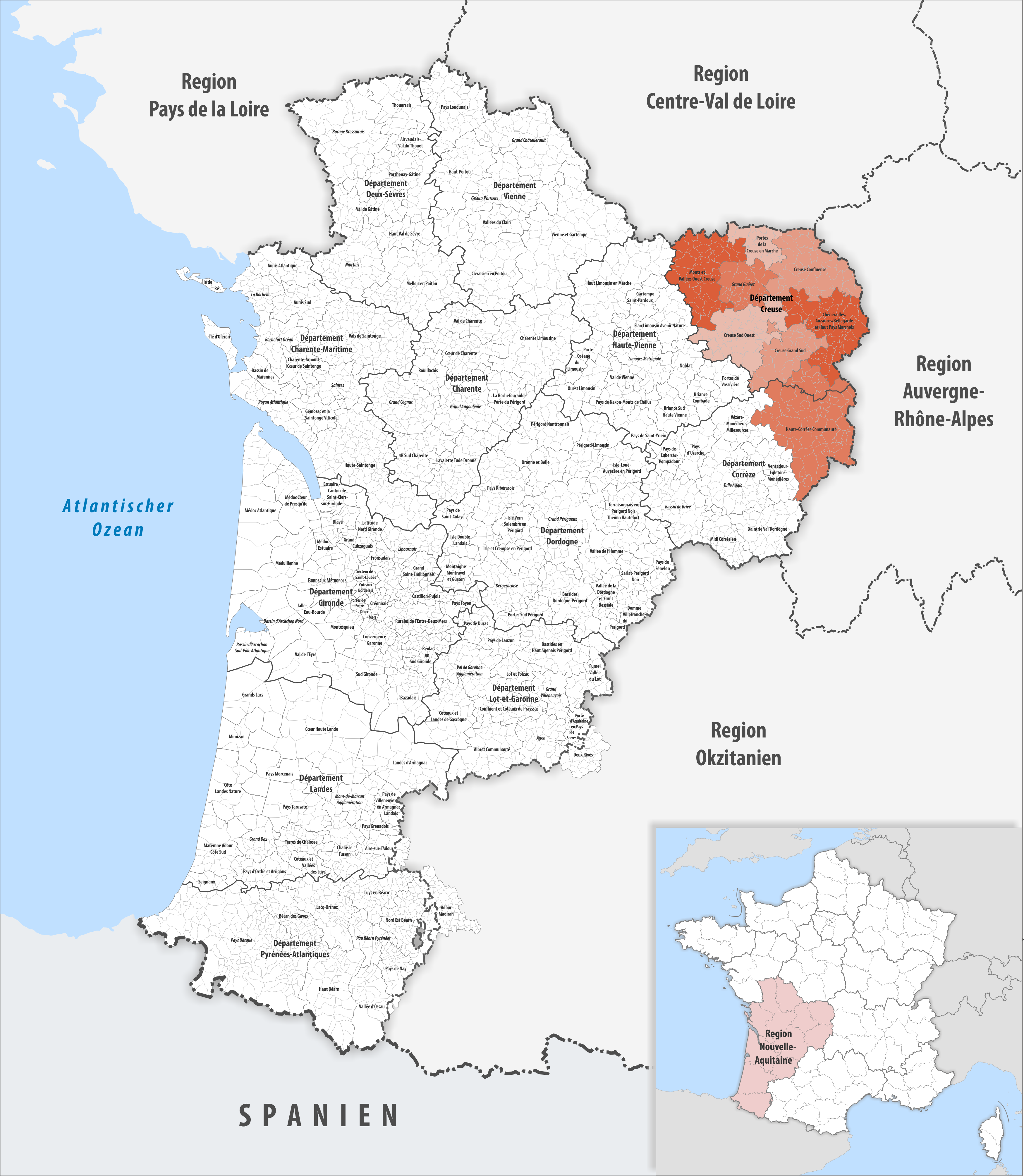 Gemeindeverbände im Département Creuse